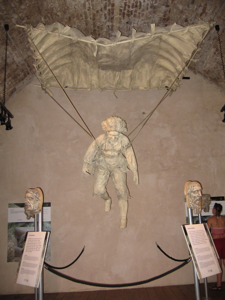 Wells museum in Šibenik, Faust Vrančić